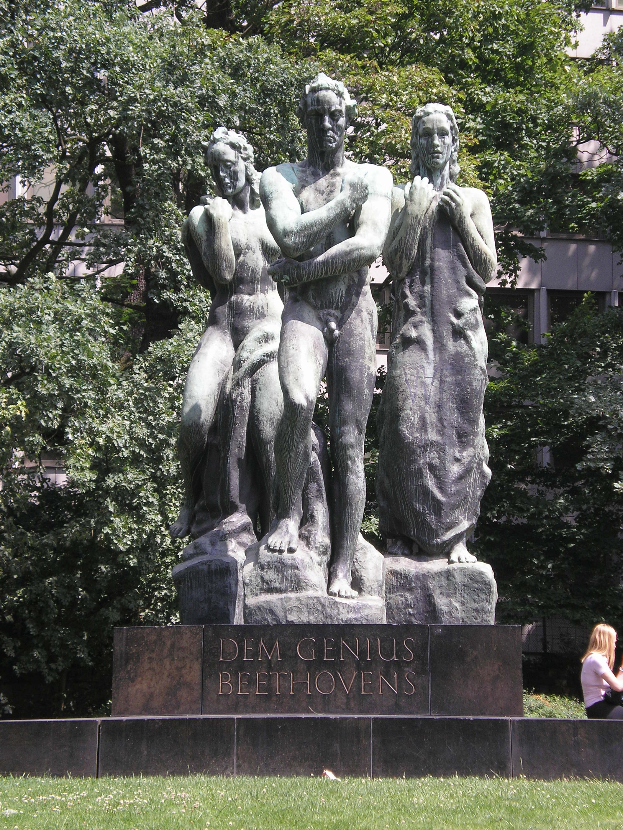 Denkmal "Dem Genius Beethovens" in Frankfurt am Main, von Georg Kolbe